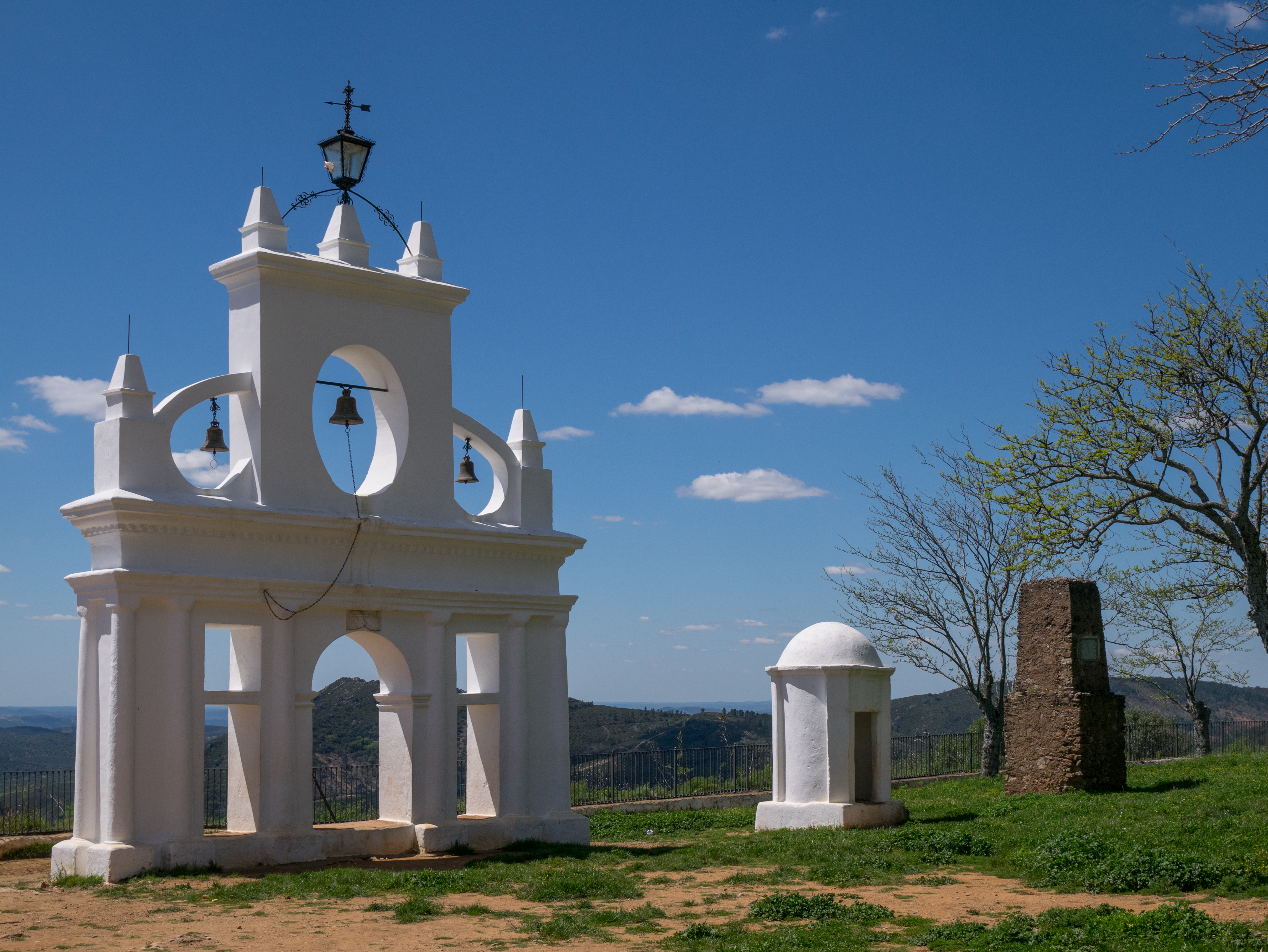 Campanario de la Ermita Reina de los Ángeles. Alájar, Huelva, Andalucía, España